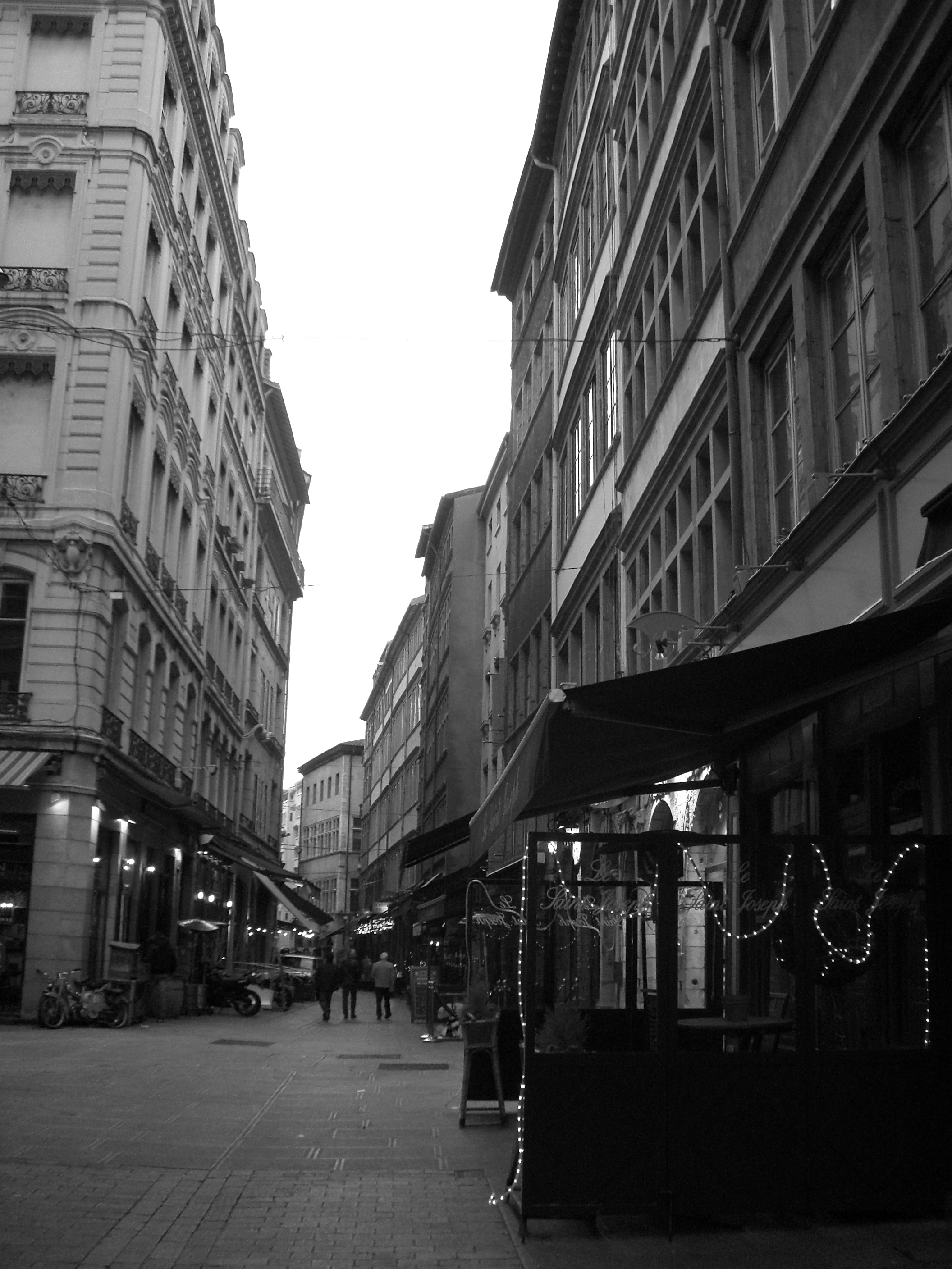 Partie centrale de la rue Mercière, vue du nord